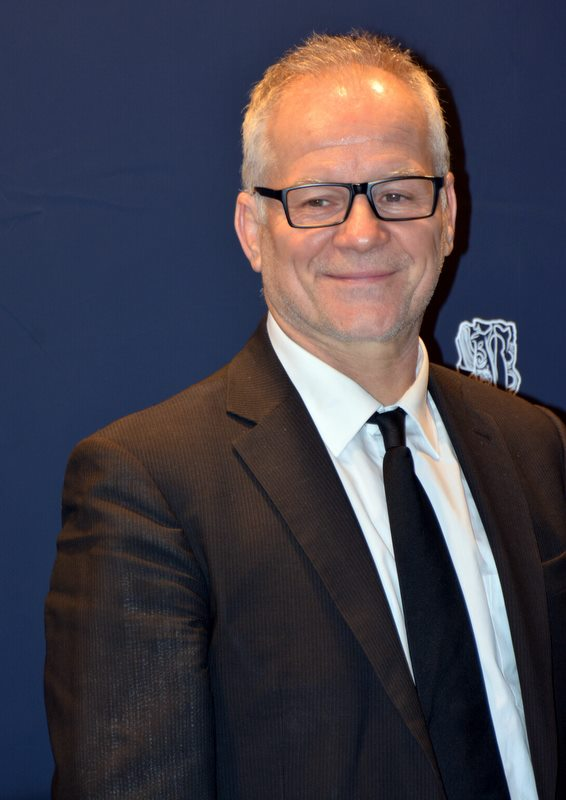 Thierry Frémaux à la cérémonie des César